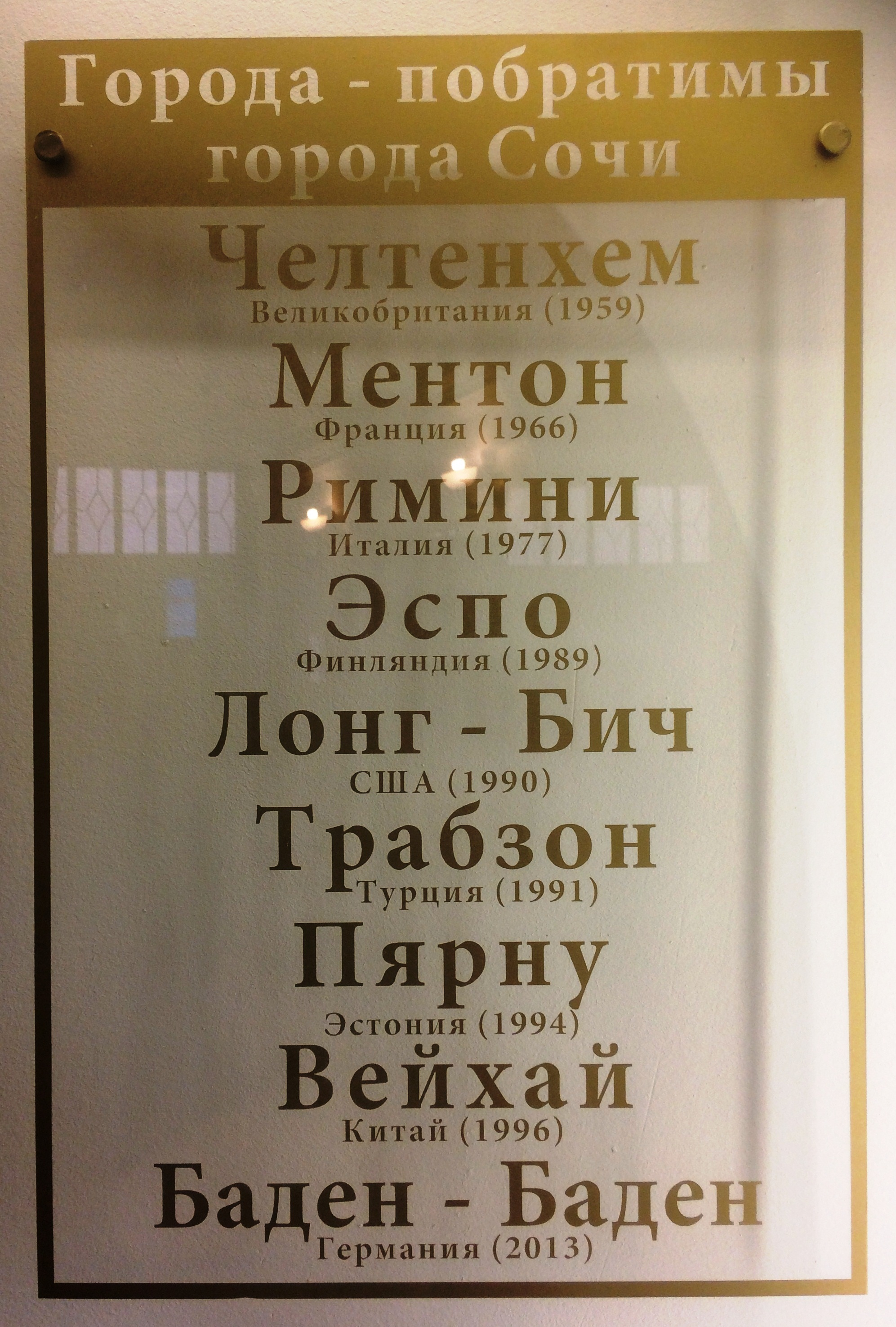 Список городов-побратимов Сочи. Фото табло из Сочинского городского музея